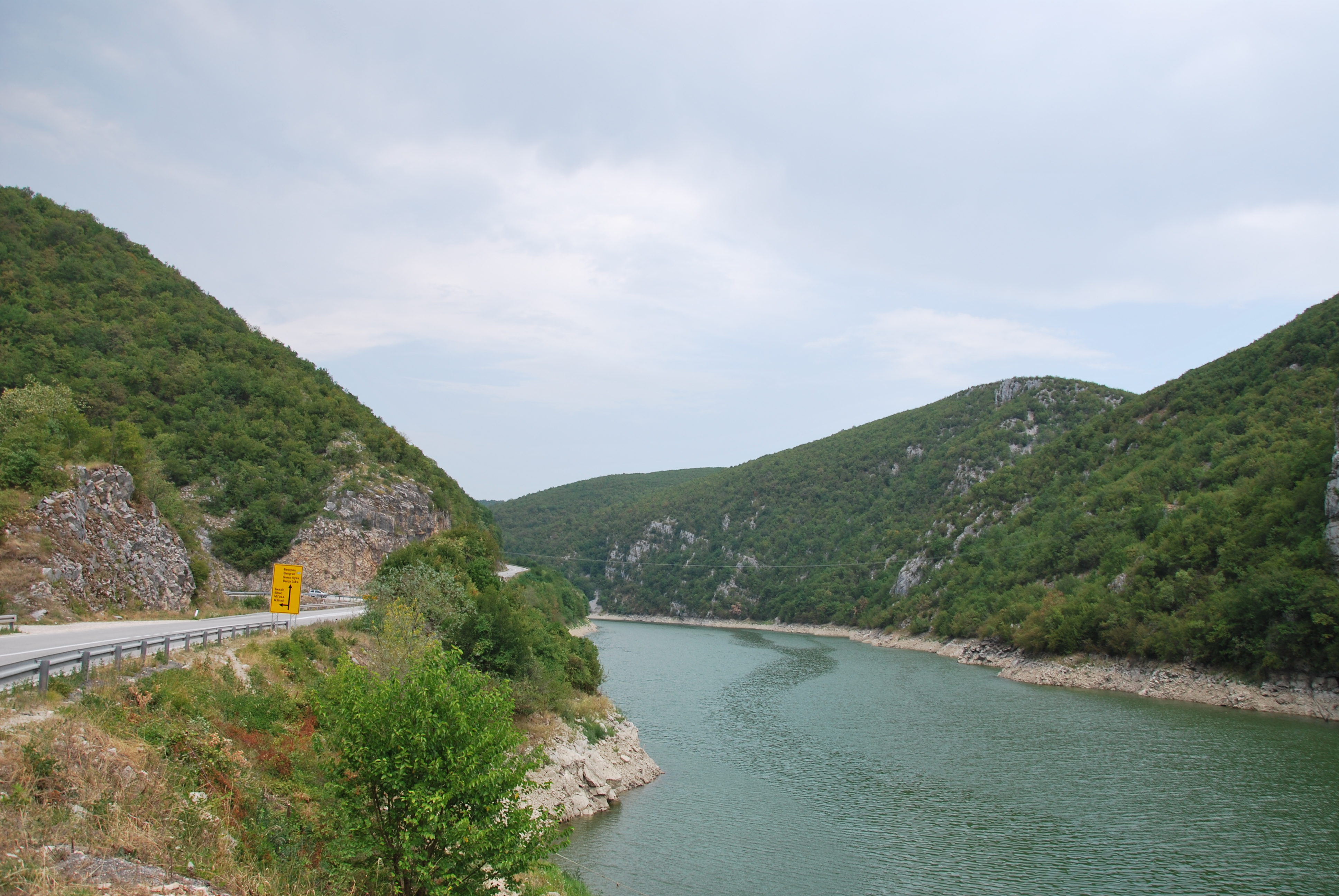 Der Fluss Vrbas in der Nähe von Mrkonjić Grad, Bosnien und Herzegowina